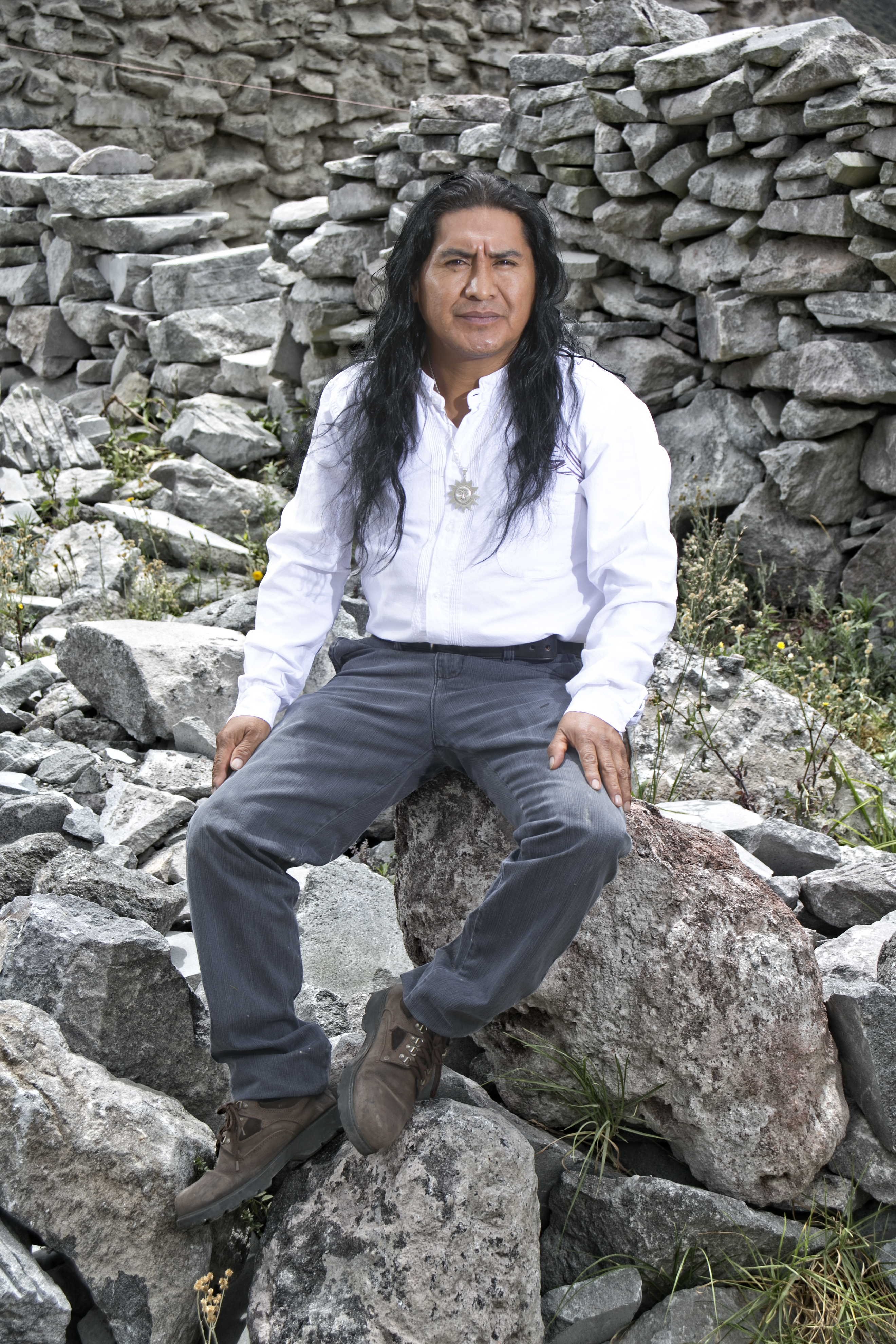 El patrimonio cultural de Ecuador esta nutrido con la comisión de uno de los representantes más importantes del siglo XXI, el pintor y escultor Cristobal Ortega Maila.